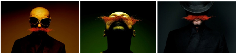 The Red Moustache, Print Durst Lambda pe suport de aluminiu, 2010, 70x100cm